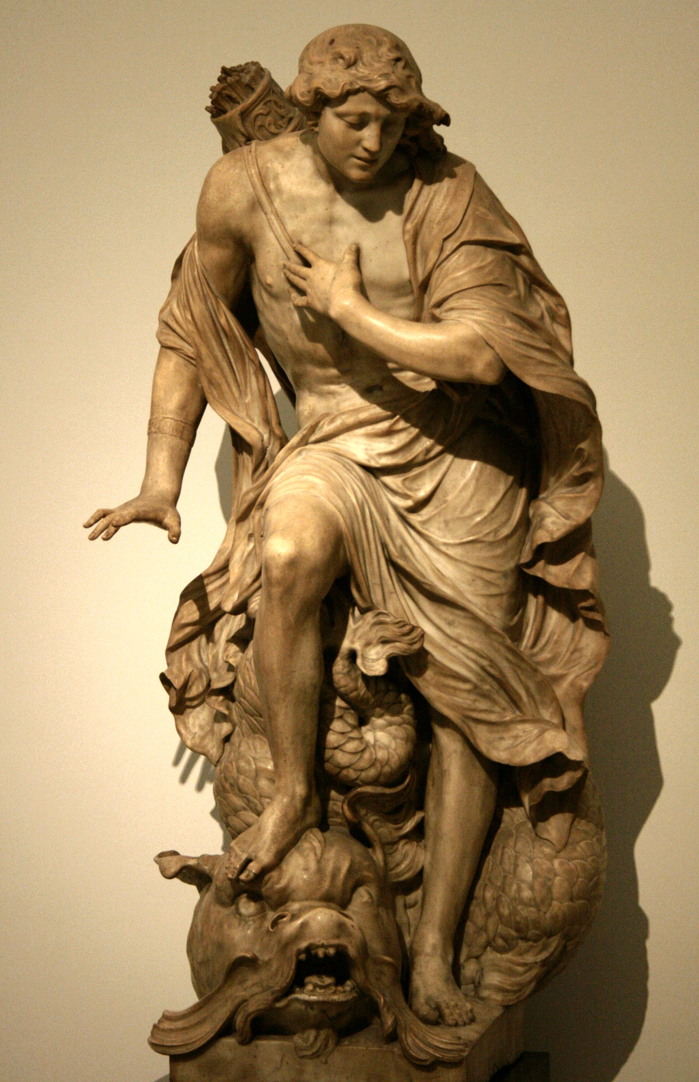 Gabriel Grupello, Narcisse (marbre). Musées royaux des Beaux-Arts de Belgique, Bruxelles, Belgique